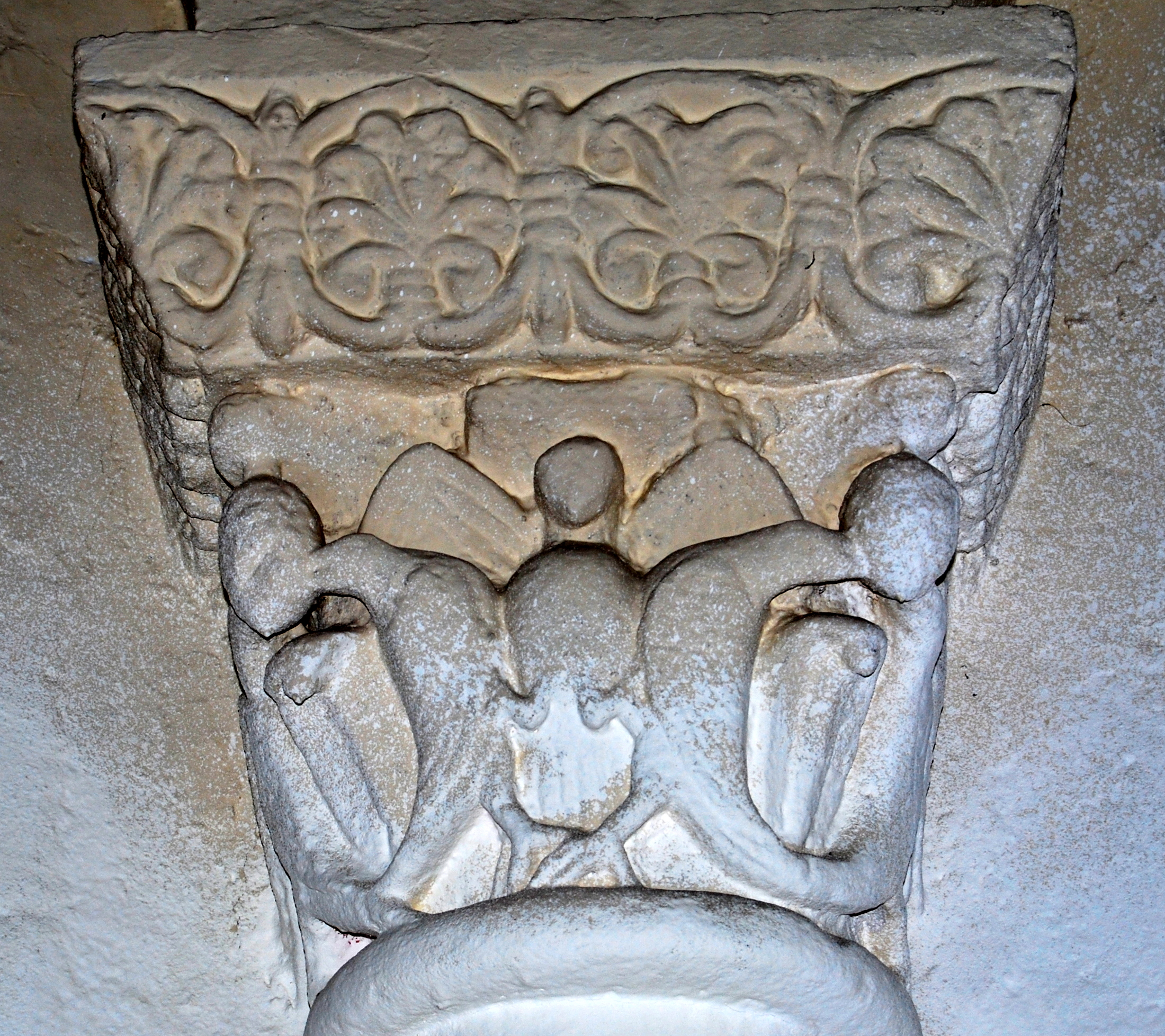 Chapiteaux de l'église Notre-Dame de Lestiac-sur-Garonne